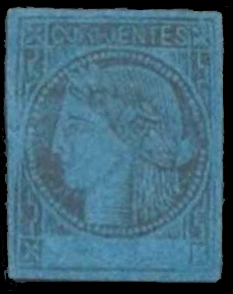 Почтовая марка аргентинской провинции Корриентес